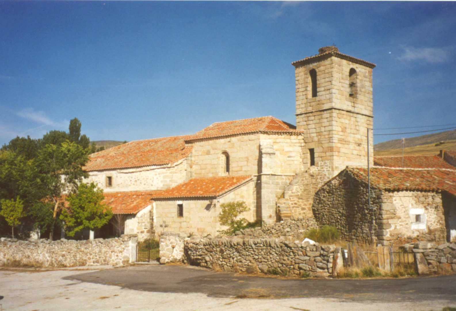 IGLESIA DE GARGANTA DEL VILLAR (AVILA, ESPAÑA)